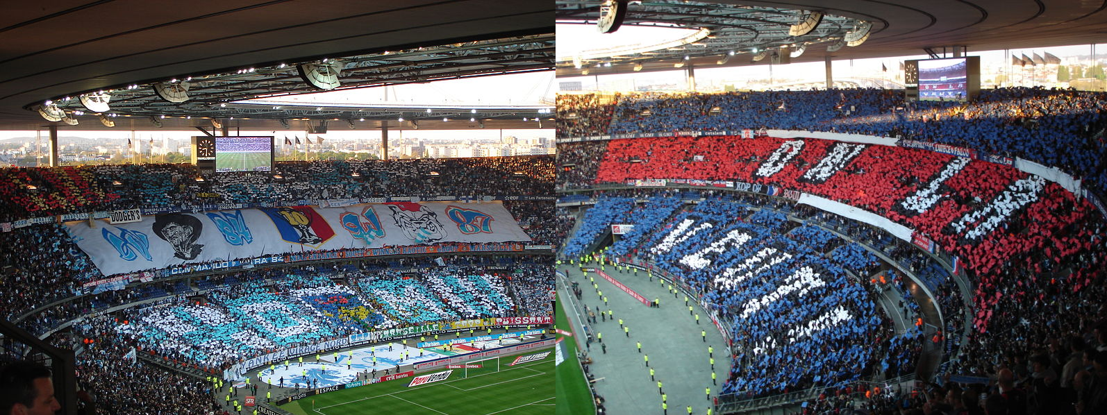 Montage photo réalisé grâce à deux images déjà présentes sur Commons illustrant la finale de la Coupe de France 2006 entre l'OM et le PSG.